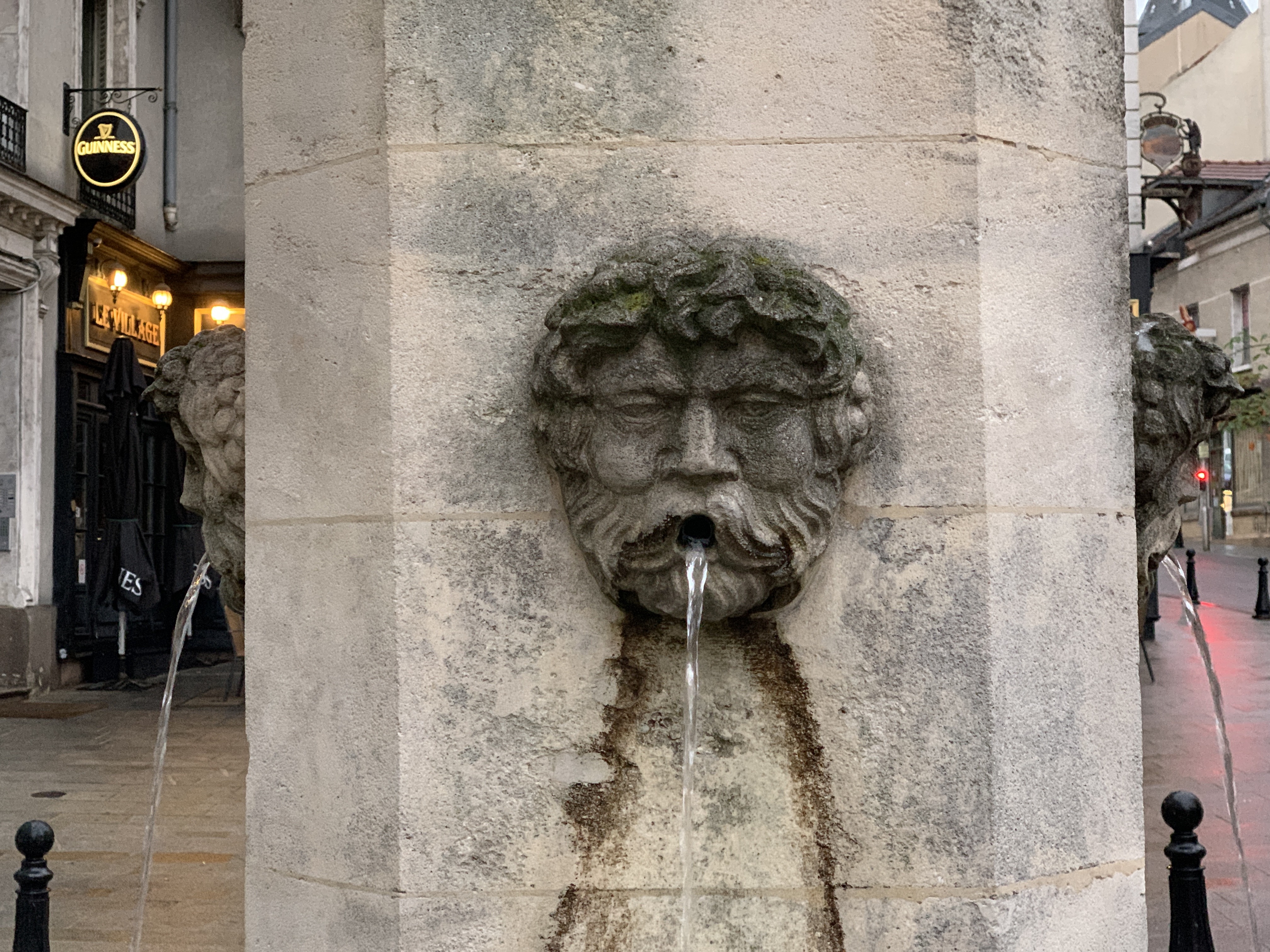 Fontaine sur la place du Général Leclerc, Fontenay-sous-Bois.